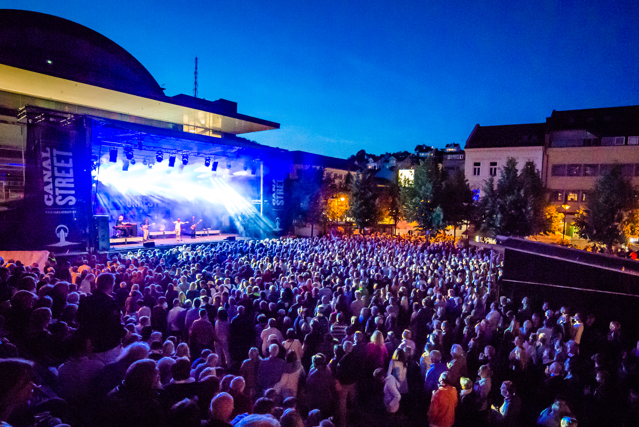 Canal Street hovedscene på Sam Eydes plass. Bo Kaspers Orkester på scenen, 23. juli 2015.